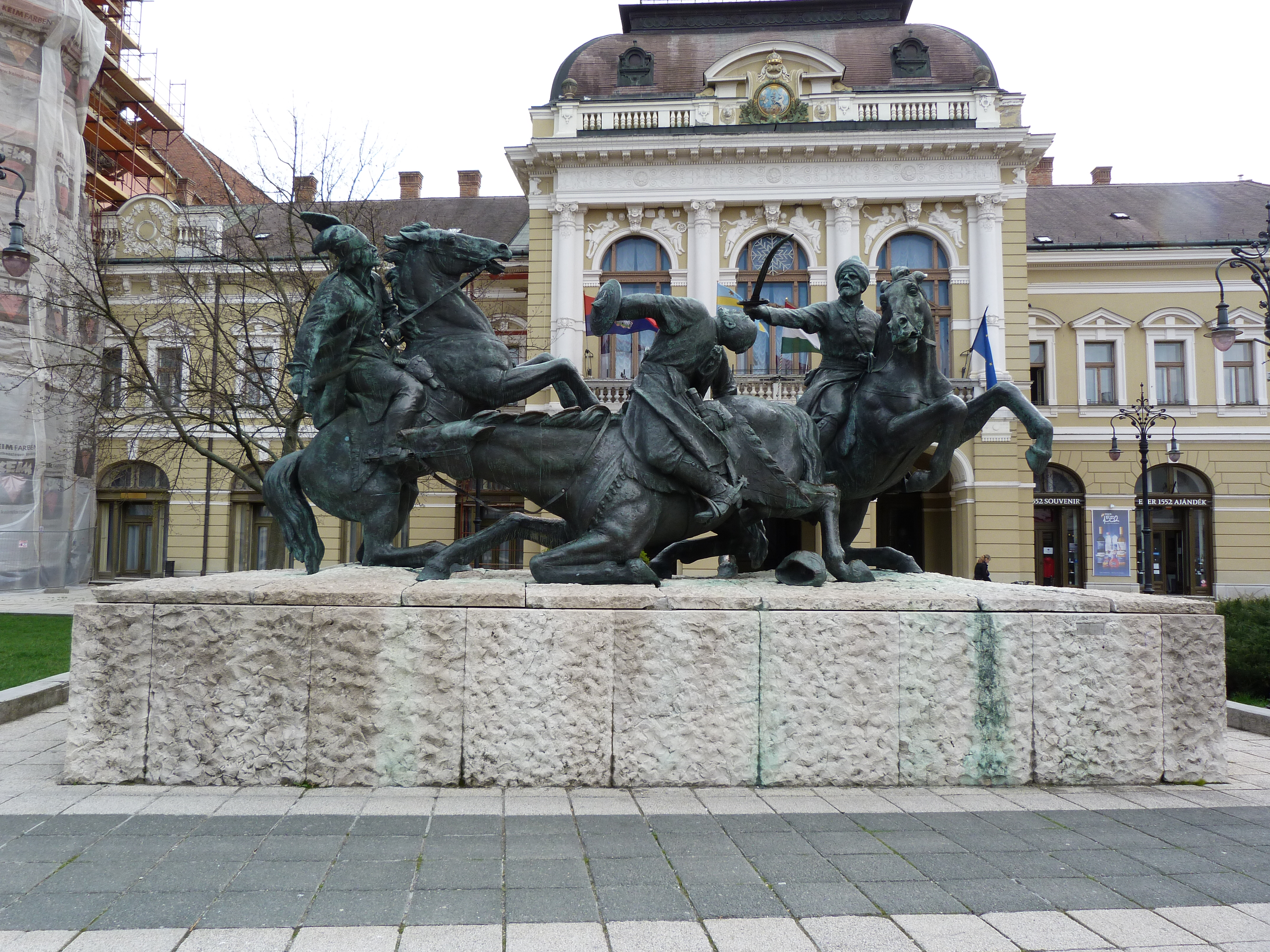 A felvétel 2013. Április 17 –én, szerdán készült Egerben. Végvári vitézek szoborcsoport. Kisfaludi Strobl Zsigmond 1967-ben felállított, Végvári vitézek szobra a Városháza épülete előtt, a Dobó téren Egerben. Forrás: egrivar.hu varbaratikoreger.hu